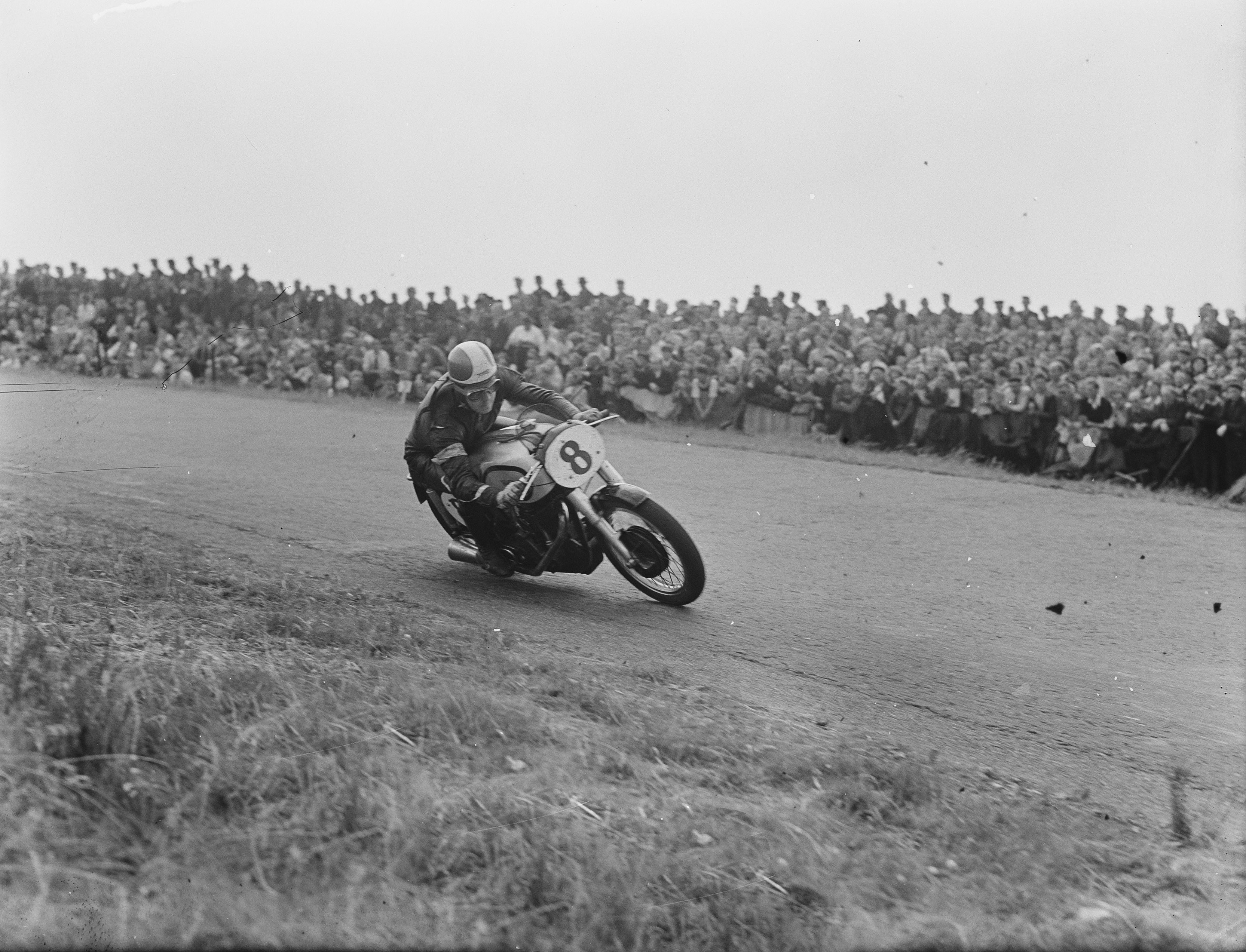 Collectie / Archief : Fotocollectie Anefo Reportage / Serie : TT Assen 1951 Beschrijving : 500 cc klasse. Geoff Duke (Norton) winnaar Datum : 7 juli 1951 Locatie : Assen Trefwoorden : motorsport Persoonsnaam : Duke, Geoff Instellingsnaam : TT Fotograaf : Pot, Harry / Anefo Auteursrechthebbende : Nationaal Archief Materiaalsoort : Glasnegatief Nummer archiefinventaris : bekijk toegang 2.24.01.09 Bestanddeelnummer : 904-6709